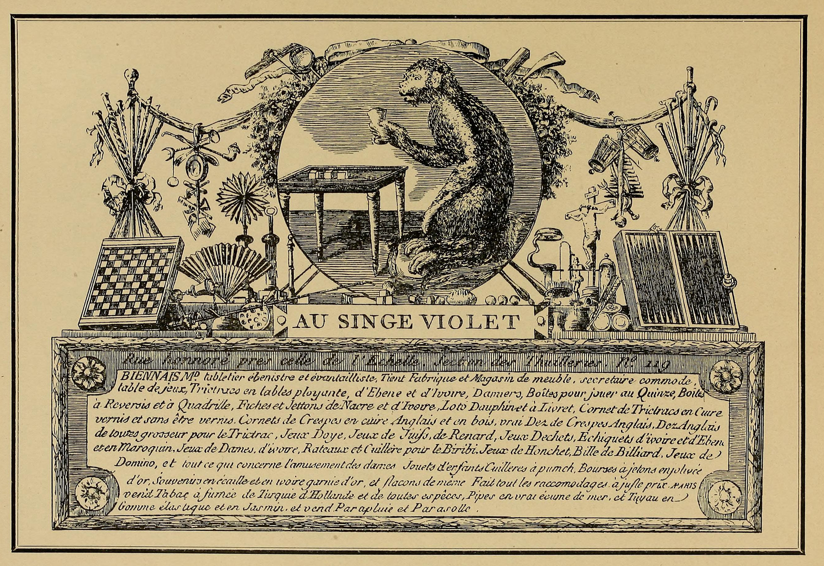 Illustration from Histoire des jouets